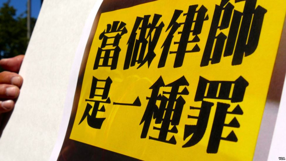 洛杉磯華人聲援中國維權律師的橫幅「當做律師是一種罪」